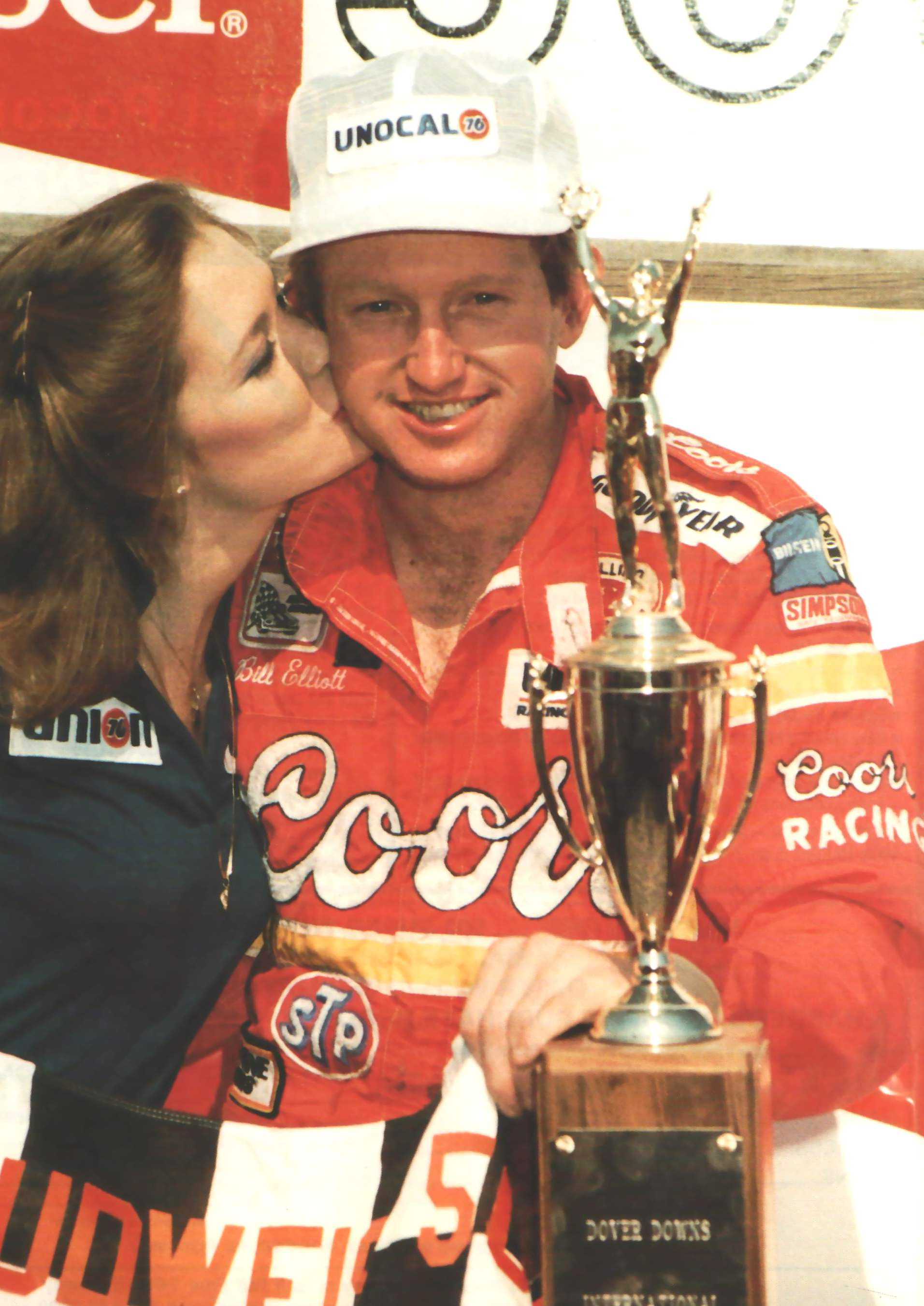 Bill Elliott 1985 NASCAR Champion